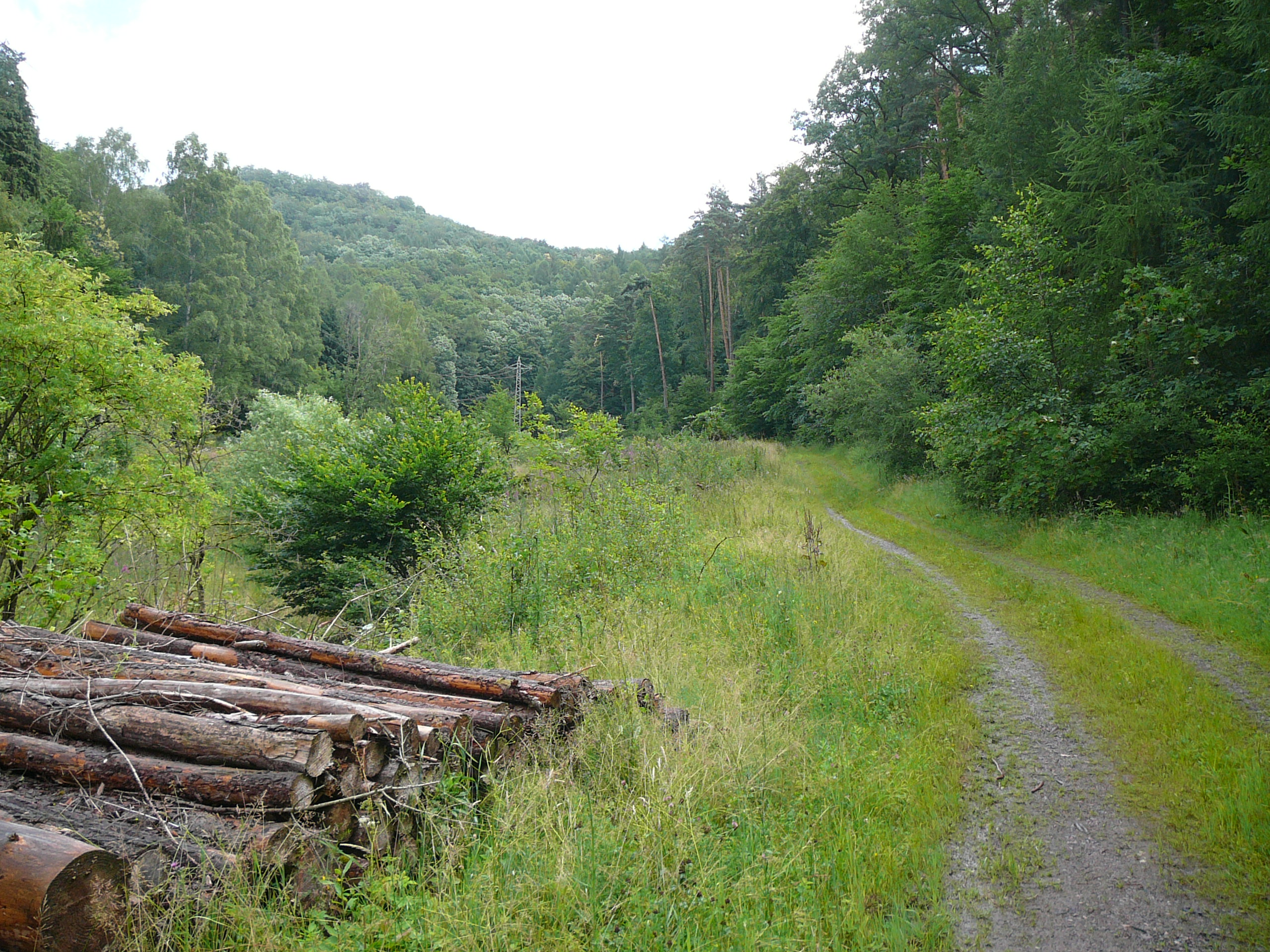 Blick ins obere Holpertal Richtung Drei Buchen und Burgberg der Ruine Meistersel